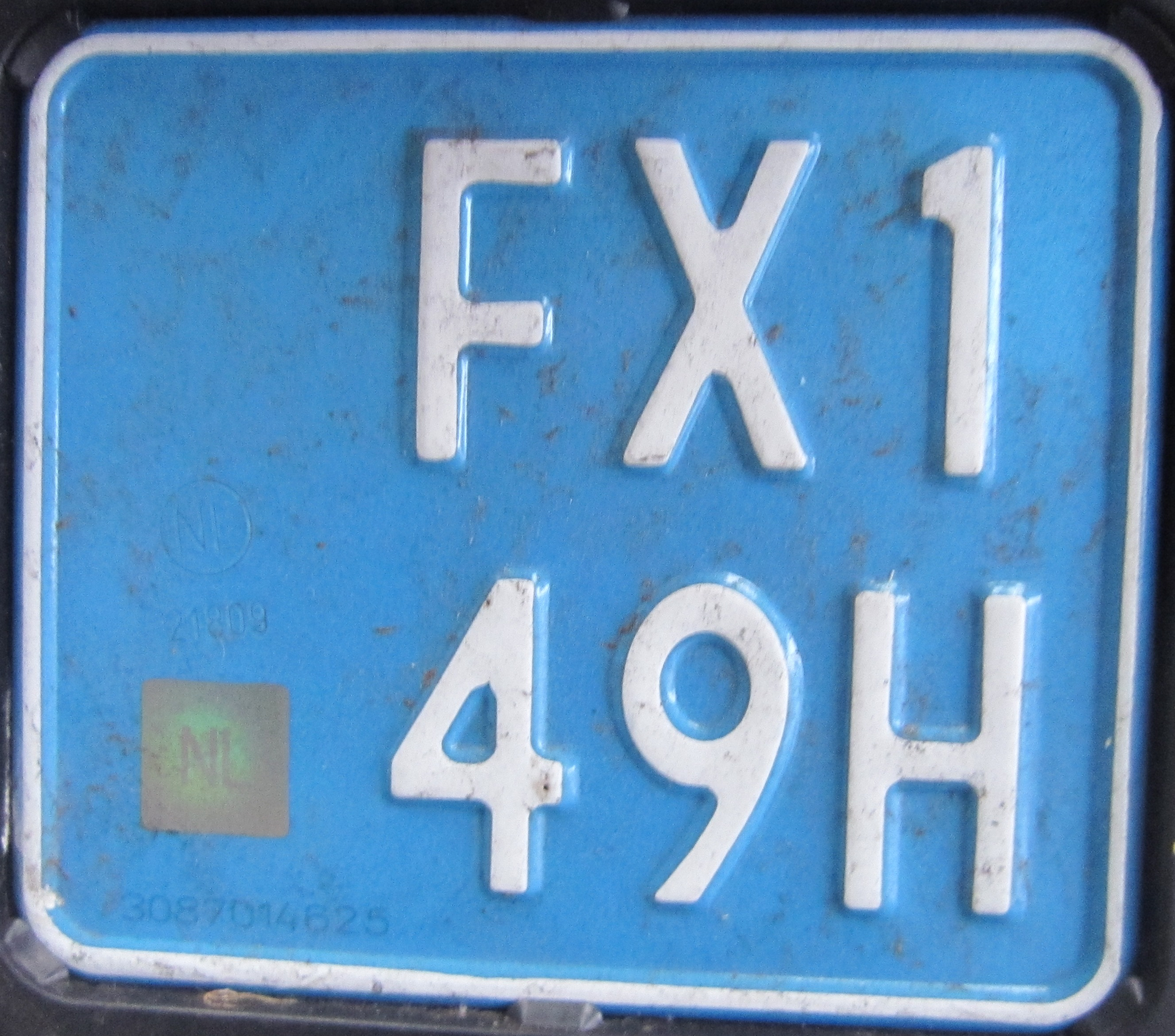 Snorfiets kentekenplaat